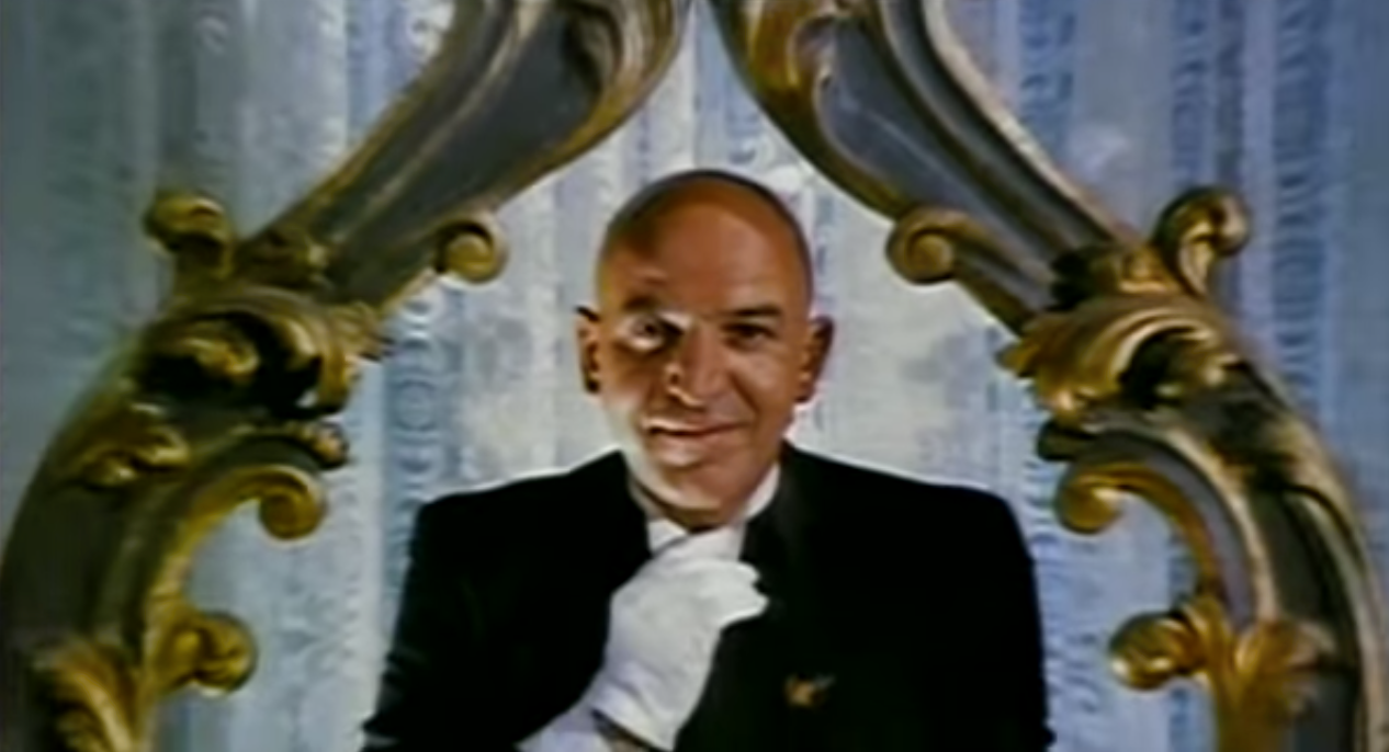 screenshot di Lisa e il diavolo film horror italiano del 1972, diretto da Mario Bava.